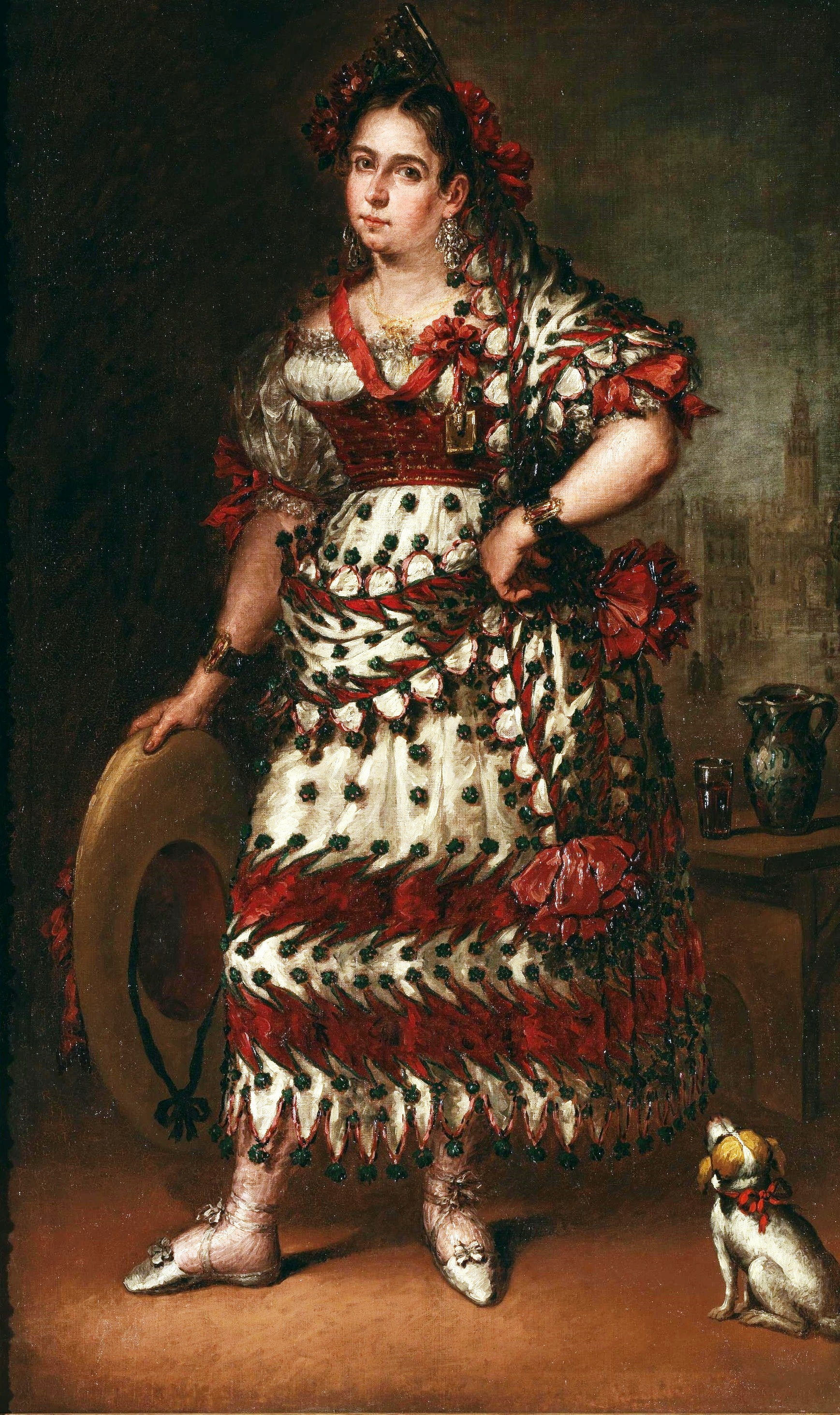 Retrato de la duquesa consorte de Frías, que aparece vestida de manola.